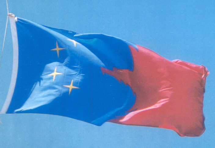 photo of Pimickikamak flag flying